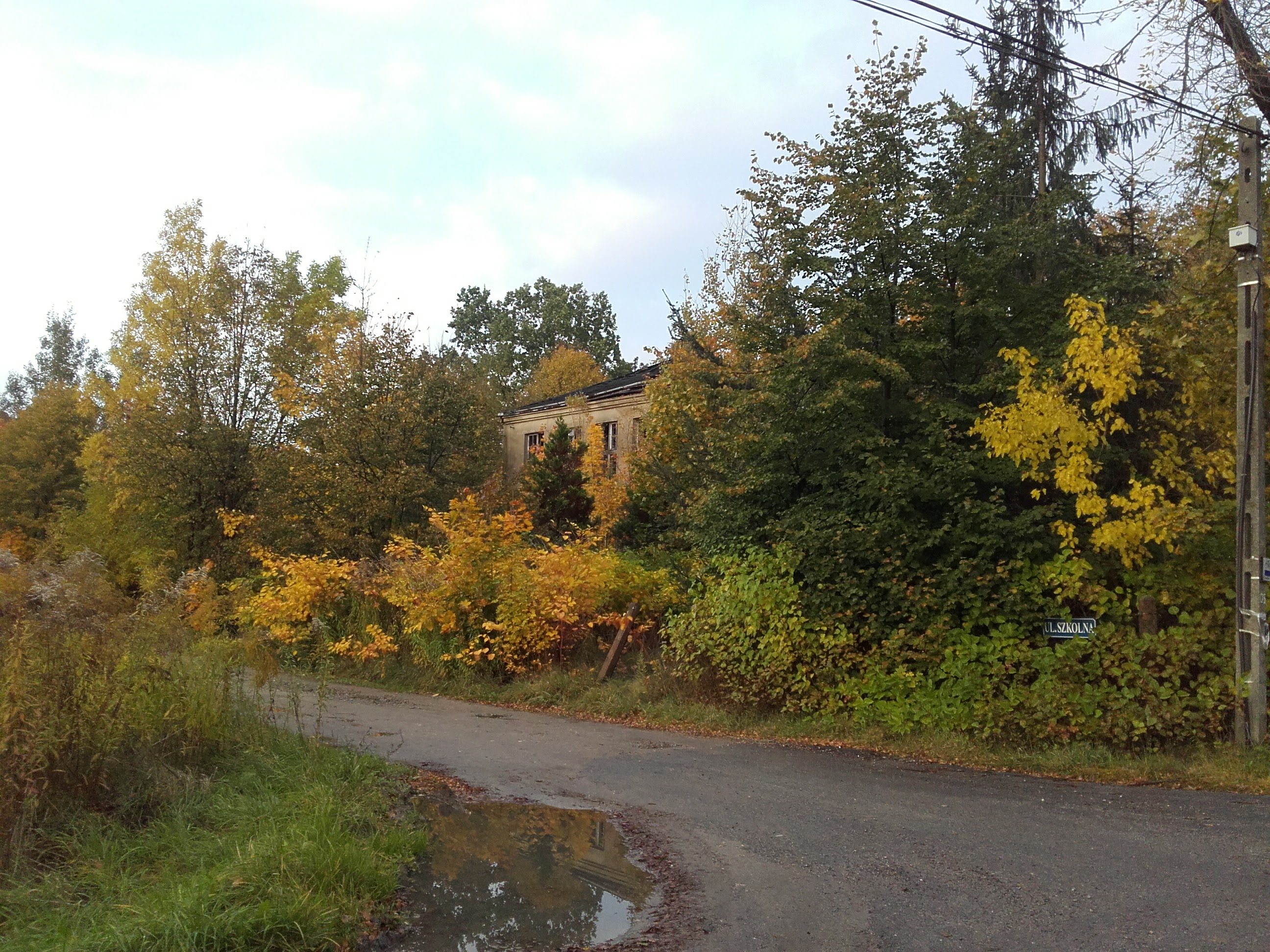 Wybudowana w 1938 roku szkoła podstawowa w Jedlicze A